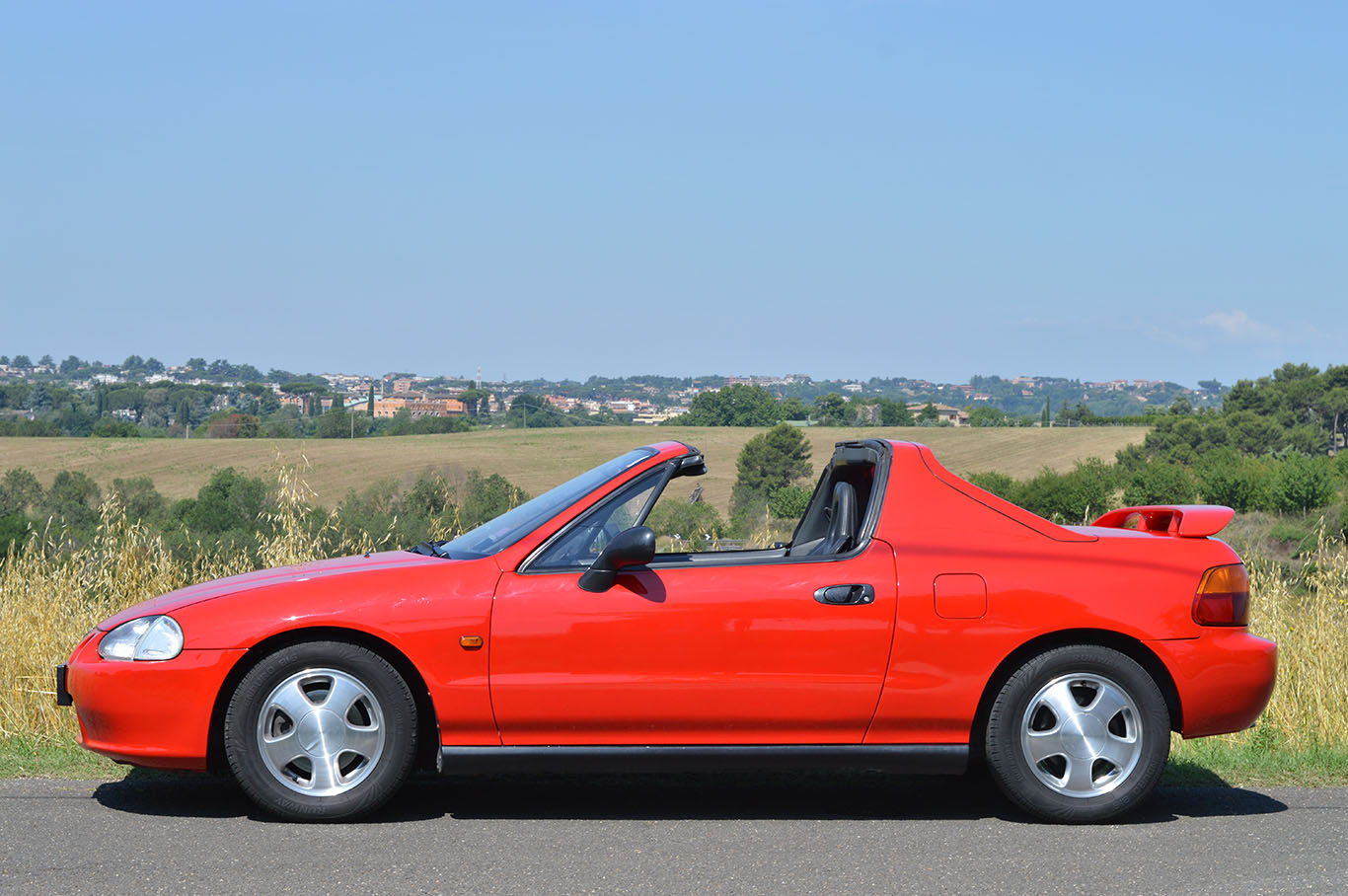 honda Crx del sol VTi